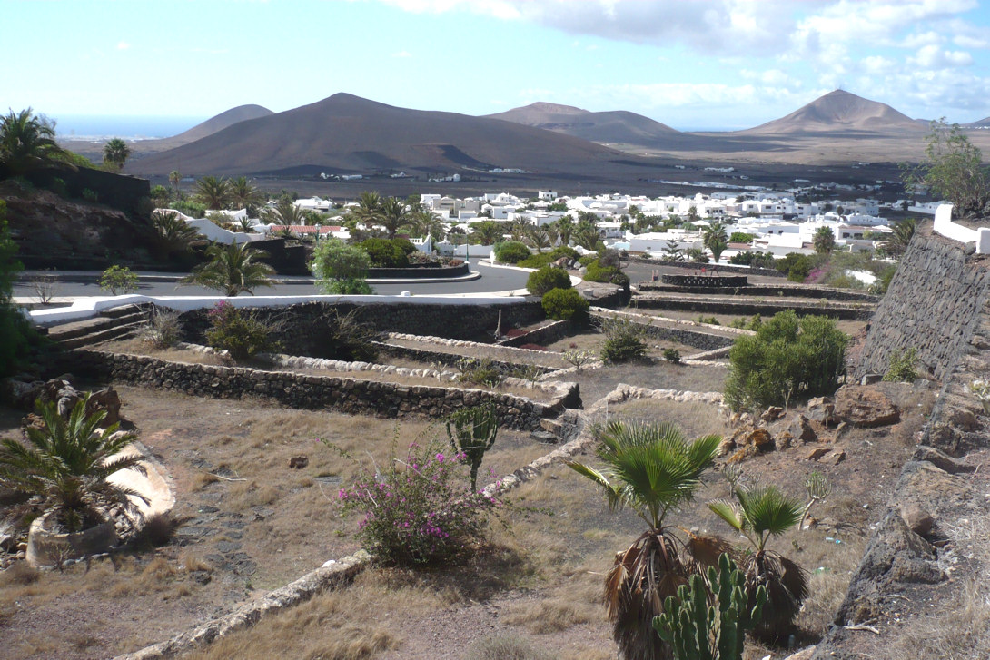 Nazaret, Lanzarote